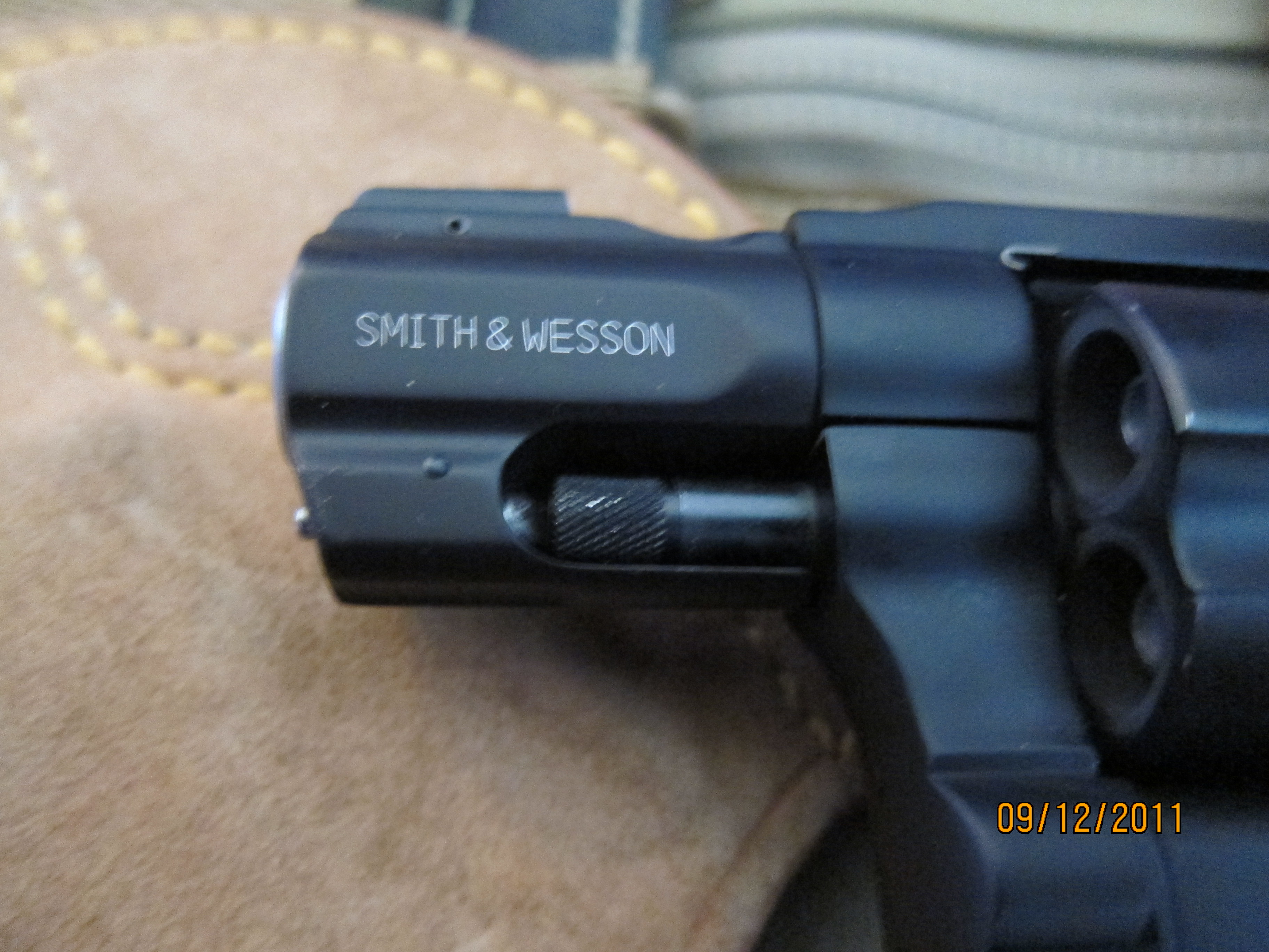 MP360 اسلحه کمری اسمیت و وسون مدل Smith & Wesson